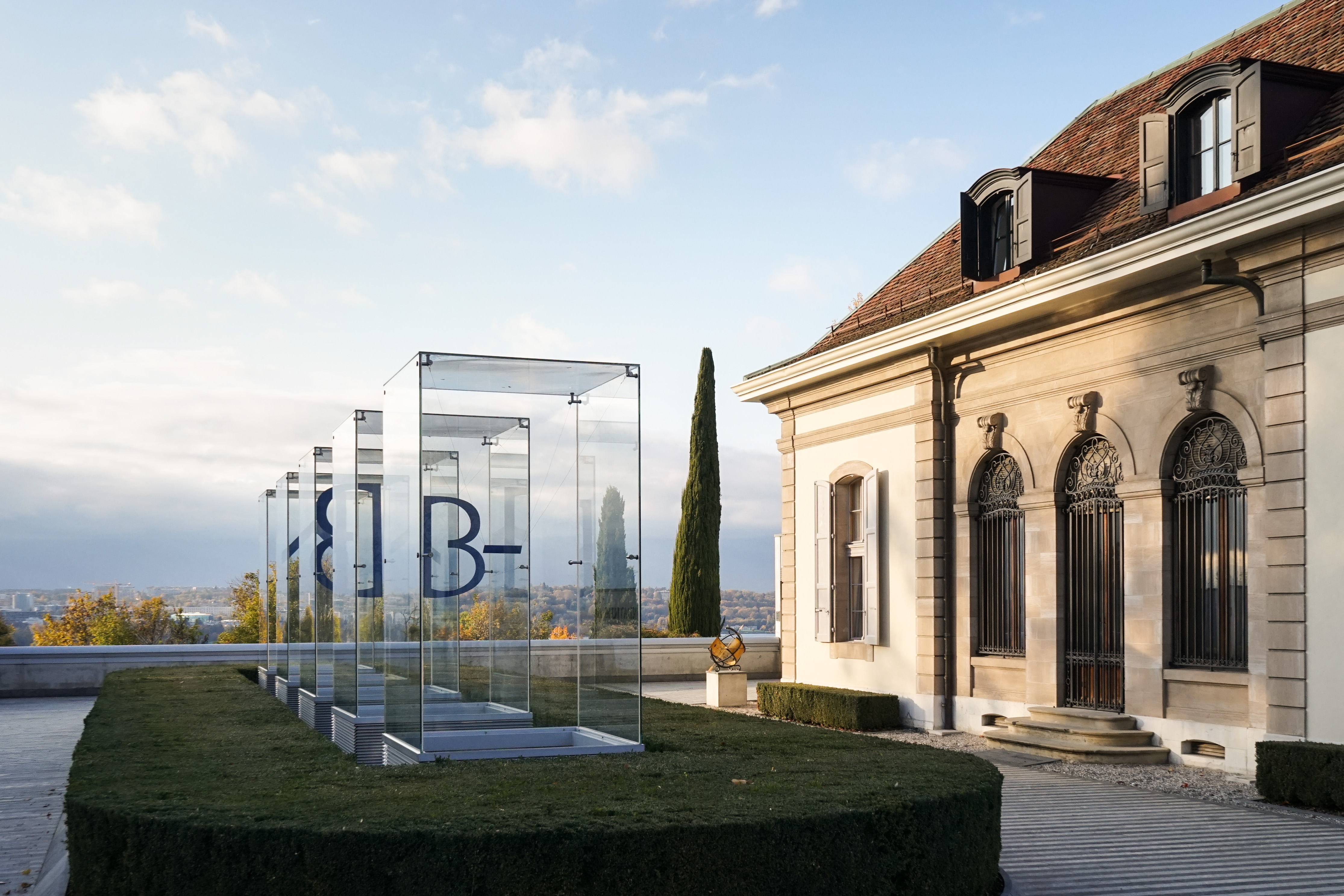 Parvis de la Fondation